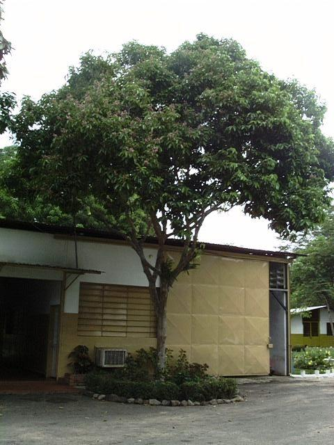 Sarrapia, Diphysa punctata